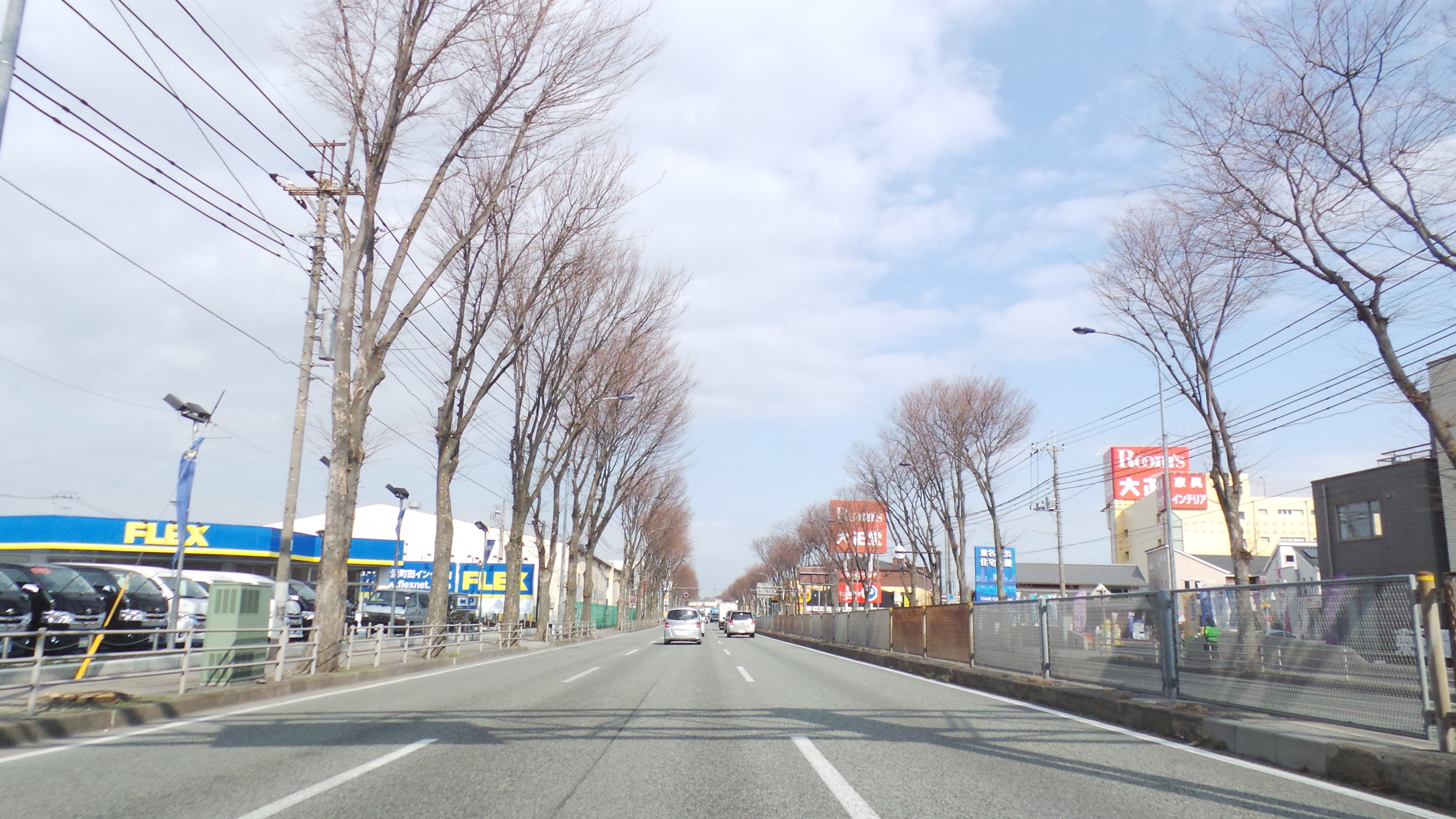 Shimotsuruma, Yamato, Kanagawa Prefecture 242-0001, Japan